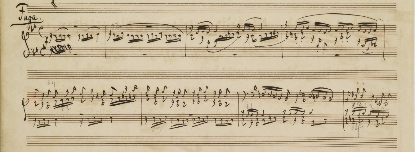 Johannes Brahms, Op. 24, Expostion der Fuga aus dem Autograph